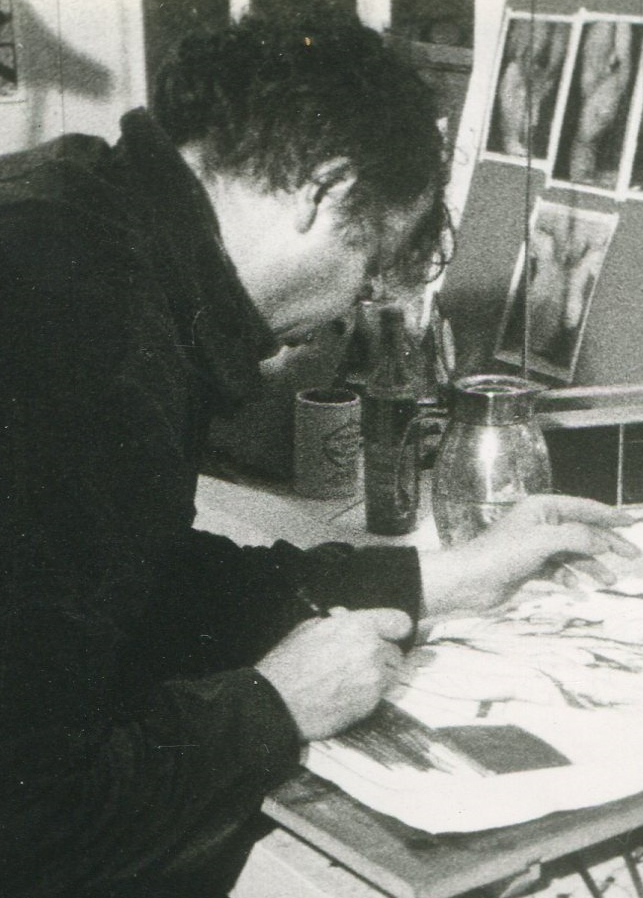 Horst Janssen in seinem Atelier in Hamburg-Blankenese am 2. Oktober 1968 bei der Zeichnung für ein Plakat für die abgesetzte Inszenierung Doppelkopf im Hamburger Schauspielhaus. Doppelkopf meinte Nazi-Auschwitz-Lagerkommandant Rudolf Höss. Janssen fertigte die Zeichnung vor einer Kamera des NDR-Freitagsmagazins im Rahmen eines Interviews an, mit dem Janssen Solidarität mit dem unter Protest zurückgetretenen Intendanten Egon Monk zeigen wollte..